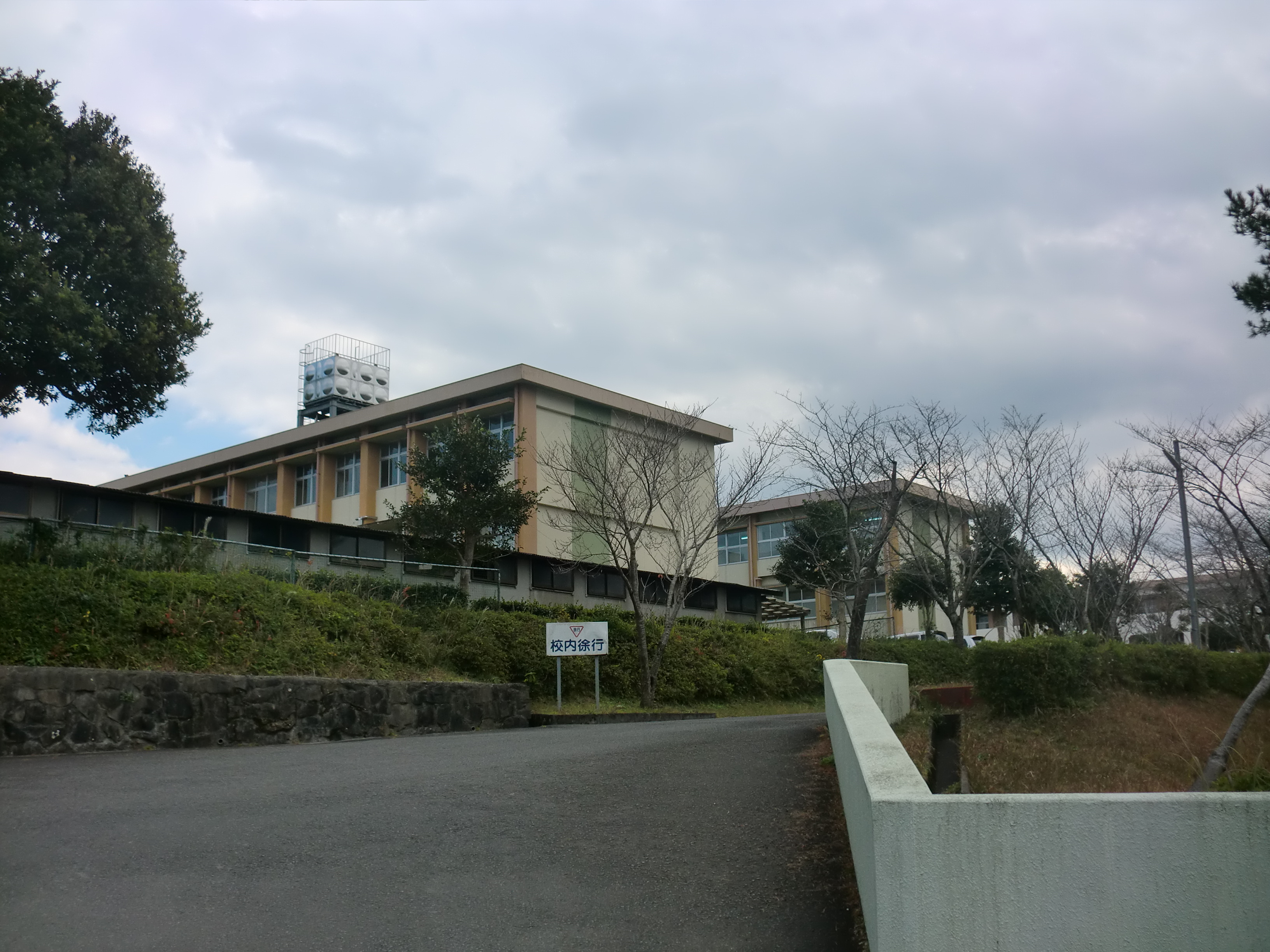 薩摩川内市にある鹿児島県立川薩清修館（せんさつせいしゅうかん）高等学校